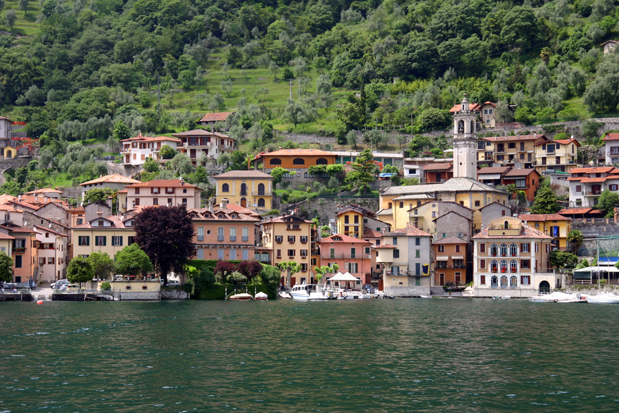 Il paese di Sala Comacina (CO), visto dall'Isola Comacina